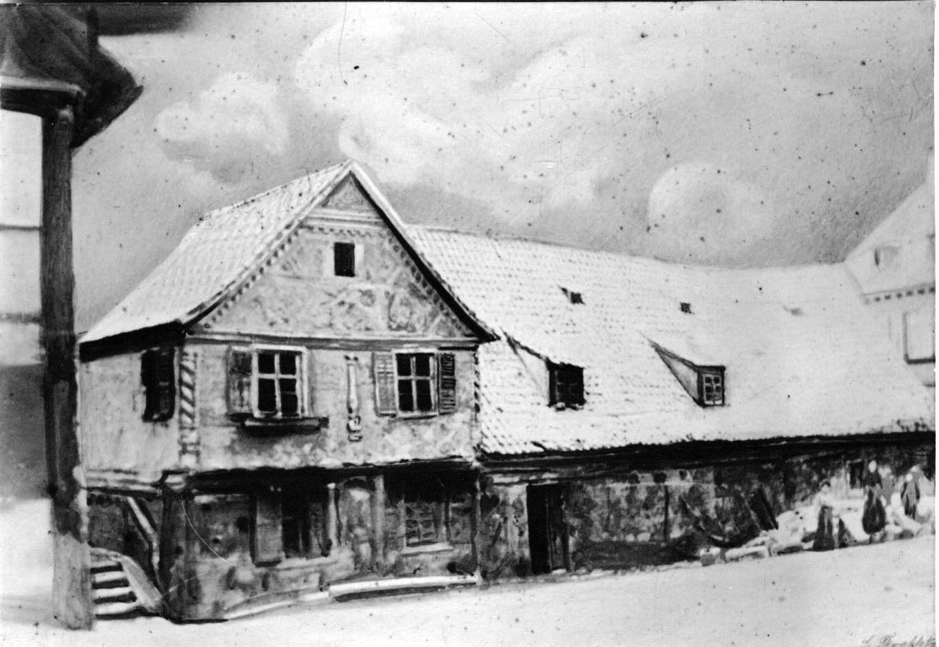 Die 1699 gebaute "alte Stadtmühle" in Burgkunstadt, Abgerissen 1903, an selber Stelle wurde das Gebäude errichtet in dem sich heute die "Alte Apotheke" befindet.